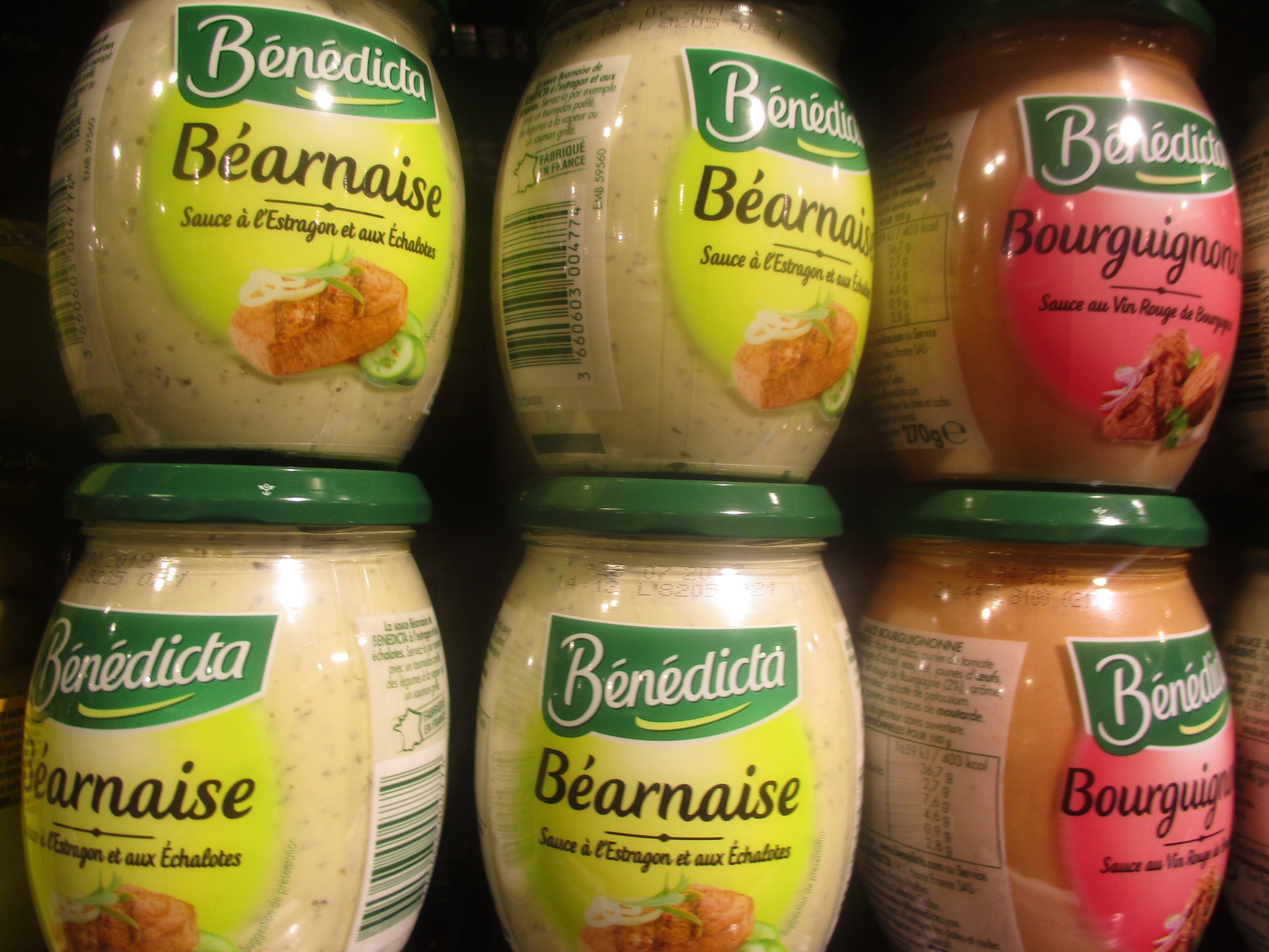 Sauces Bénédicta béarnaise et bourguignonne.